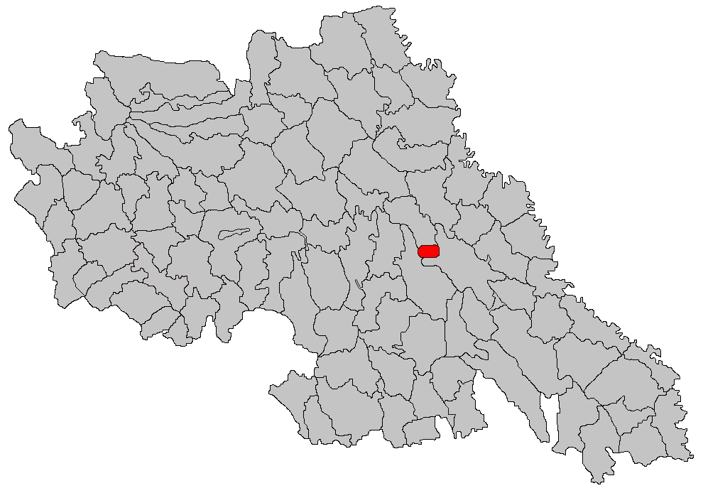 Categorie:Hărţi ale judeţului Iaşi